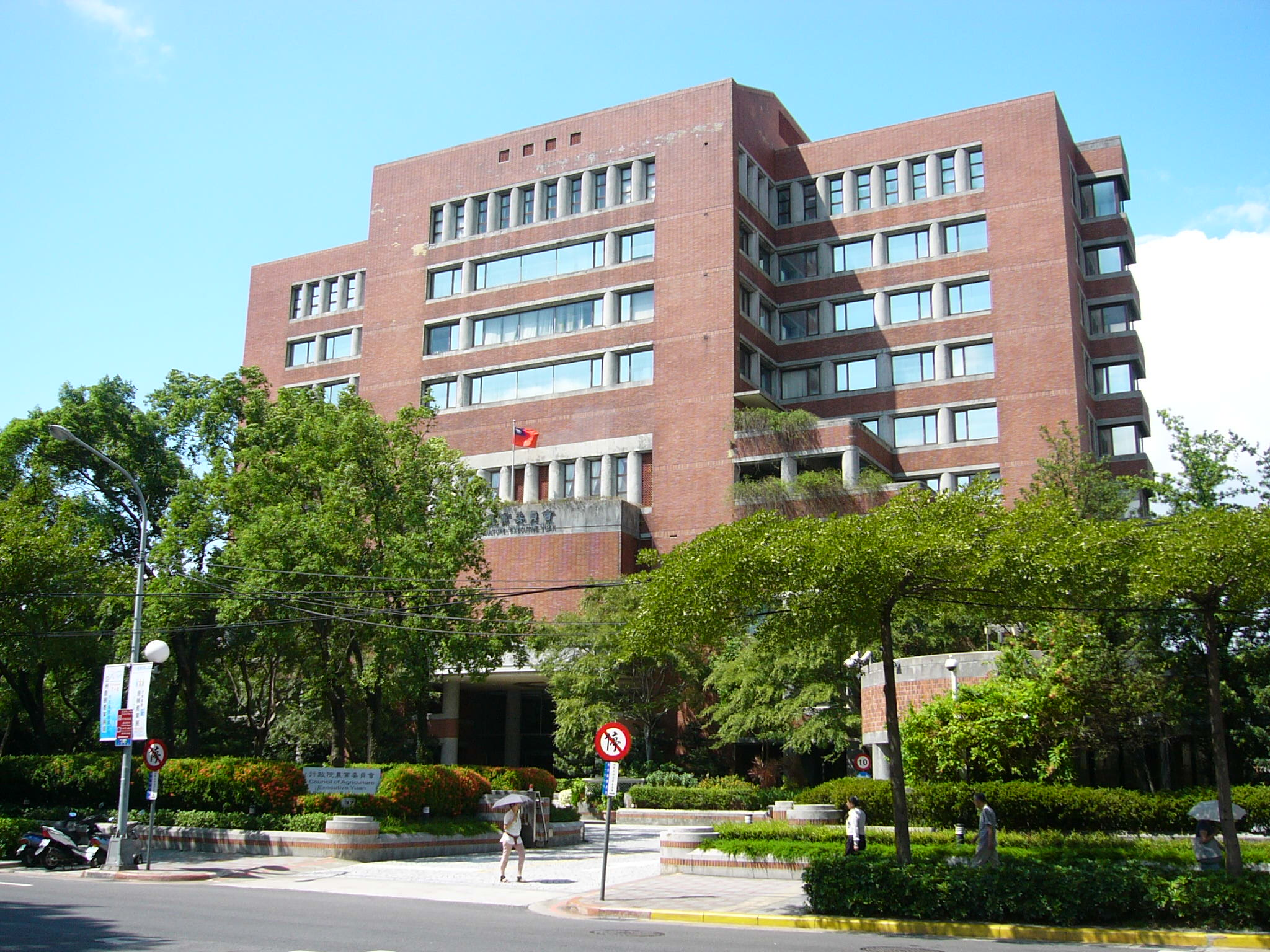 行政院農業委員會大樓，位於臺北市中正區南海路37號。